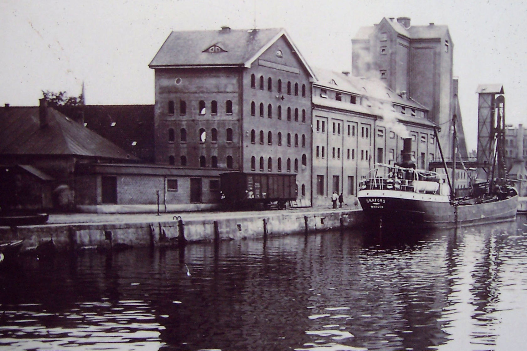 Hafenbahn Eckernförde etwa 1920 - Foto einer Informationstafel im Hafen Eckernförde